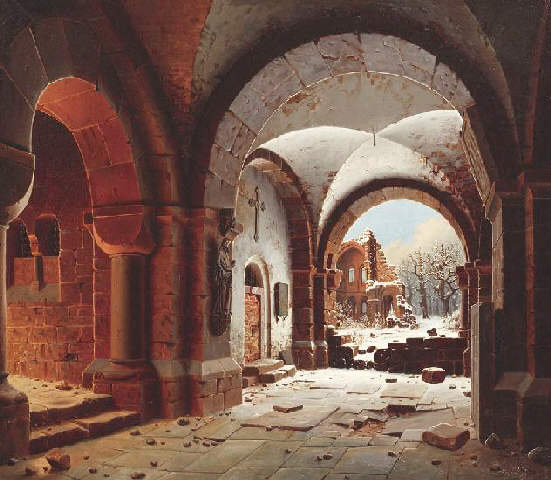 Klosterruine Heisterbach im Schnee. Blick durch den Kreuzgang auf den verfallenen Chorbau